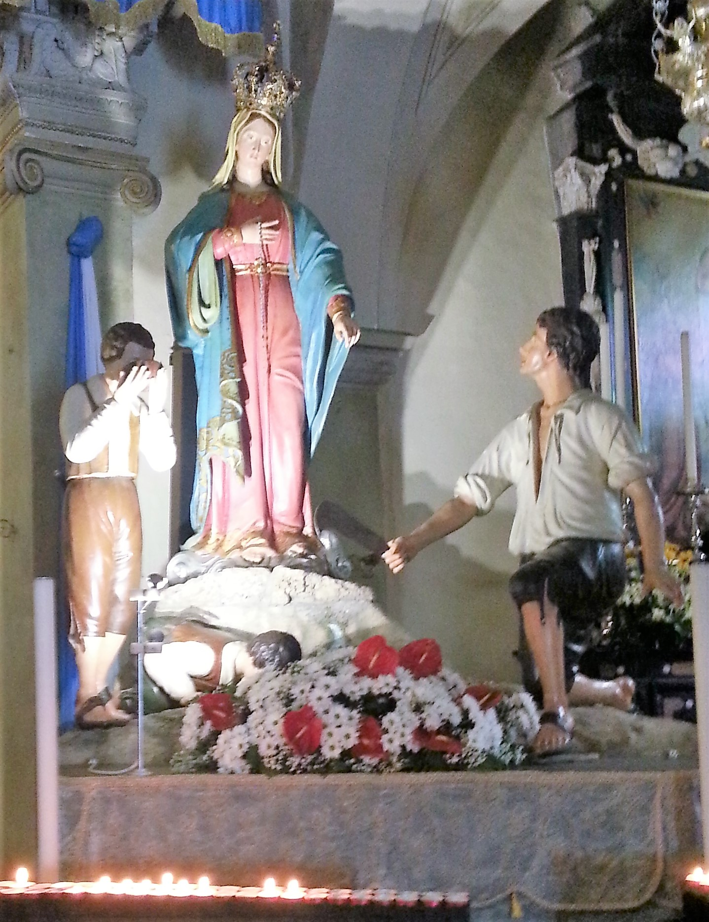 Statua della Vergine del miracolo